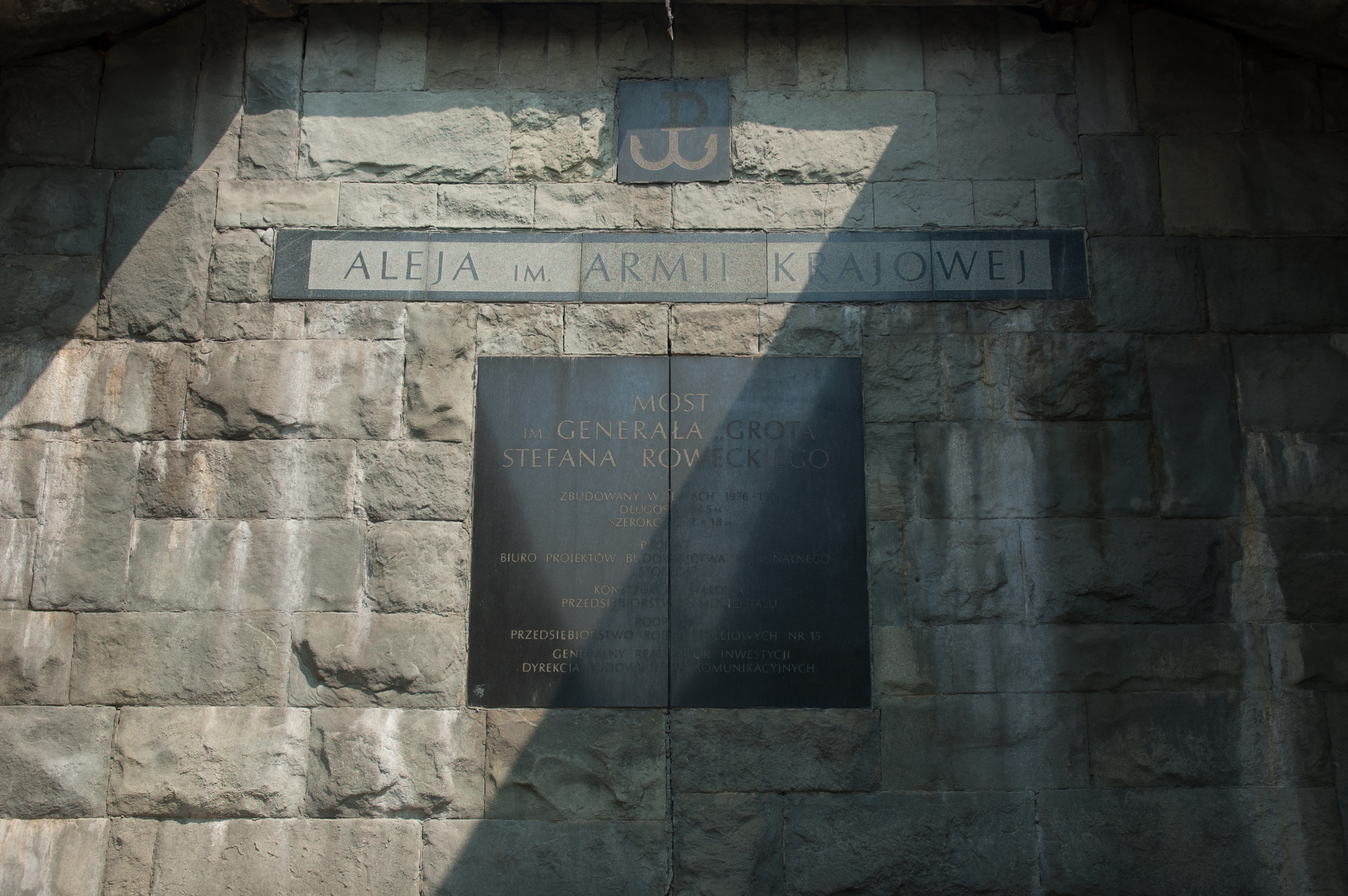 Tablica pamiątkowa - Trasa Armii Krajowej - Most gen. Stefana Grota-Roweckiego